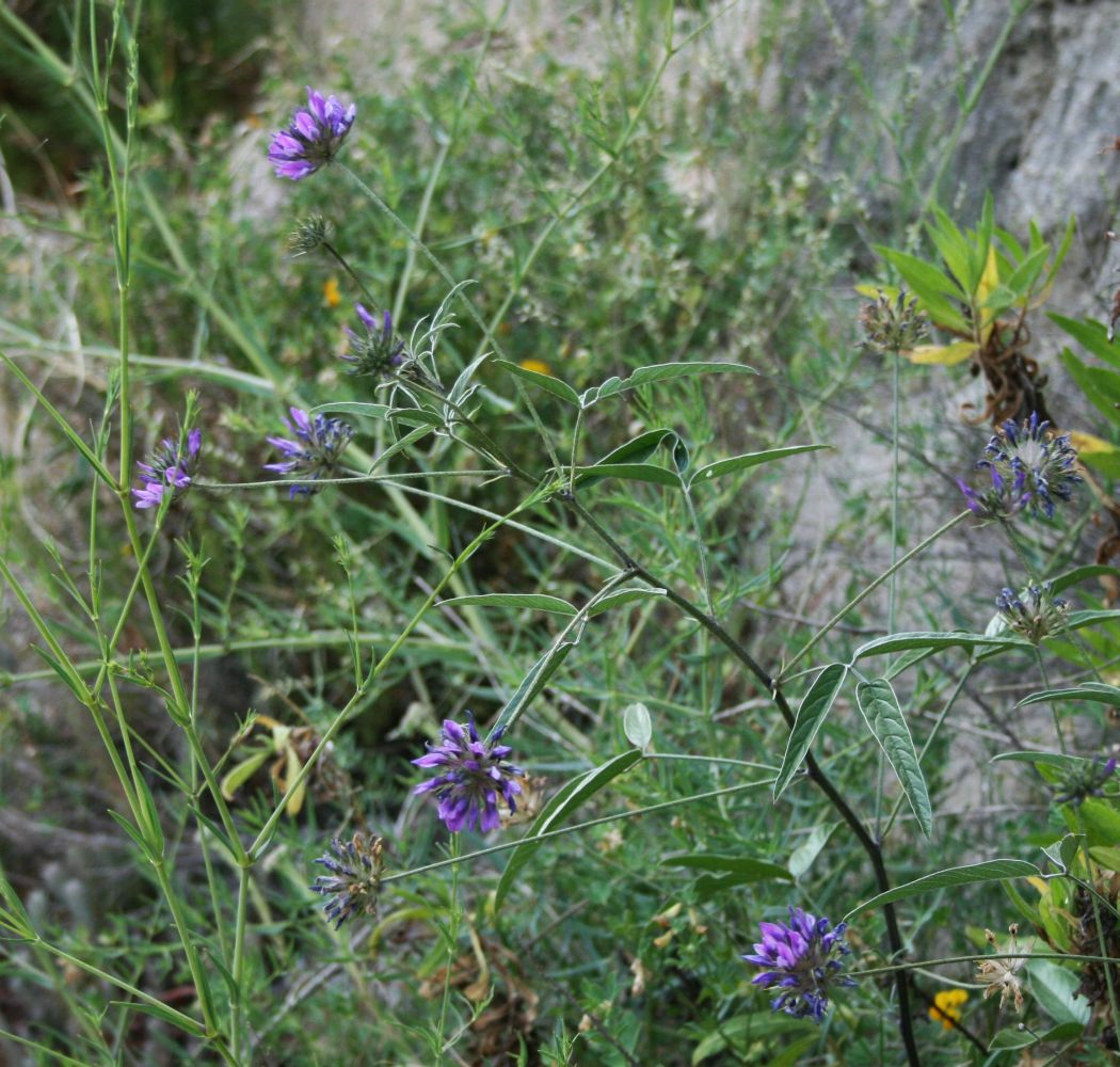 Bituminaria bituminosa, Hülsenfrüchtler (Fabaceae), Schmetterlingsblütler (Faboideae) - Italien/Italia/Italy: Kalabrien/Calabria, Prov. Reggio Calabria, Aspromonte, bei San Peri, SSE Scilla